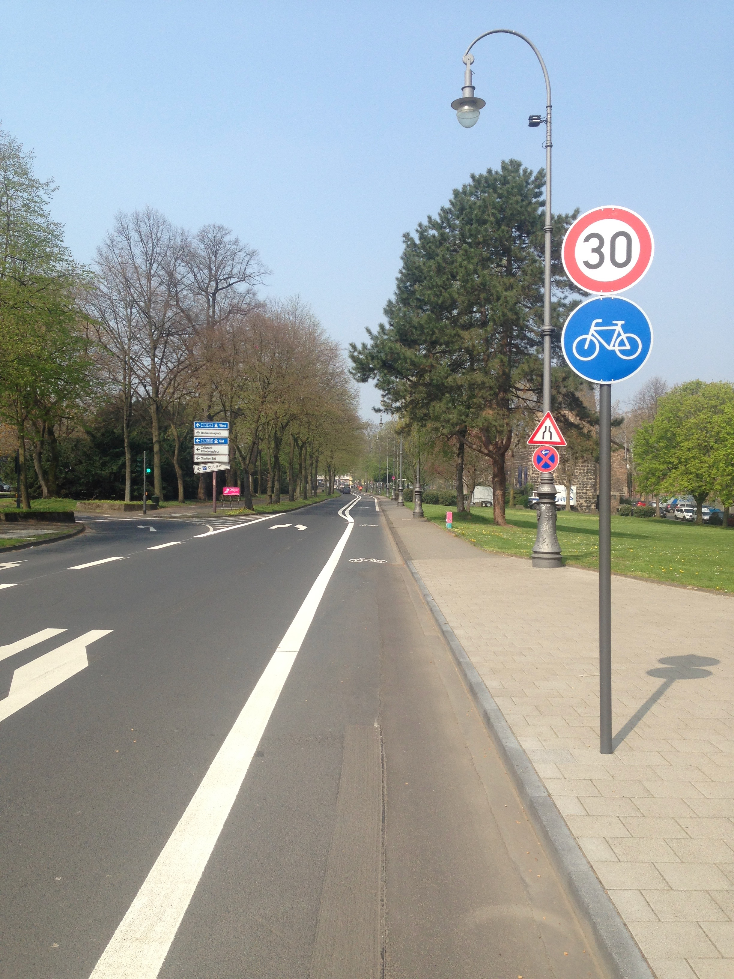 Sachsenring von der Ulrepforte kommend in Richtung Barbarossaplatz nach dem #RingFrei Umbau.